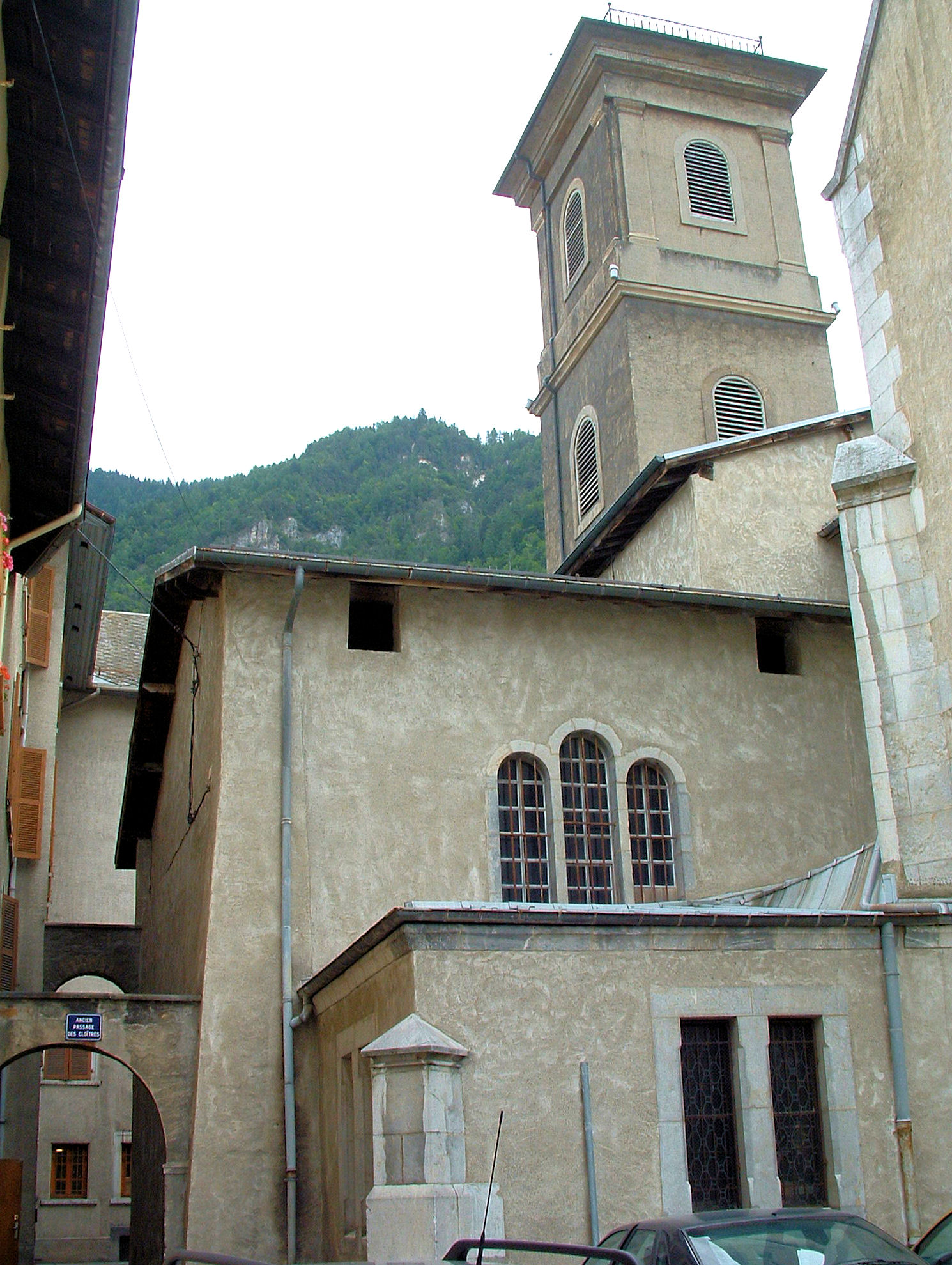 Moûtiers - Cathédrale Saint-Pierre - Chapelle latérale nord et tour orientale